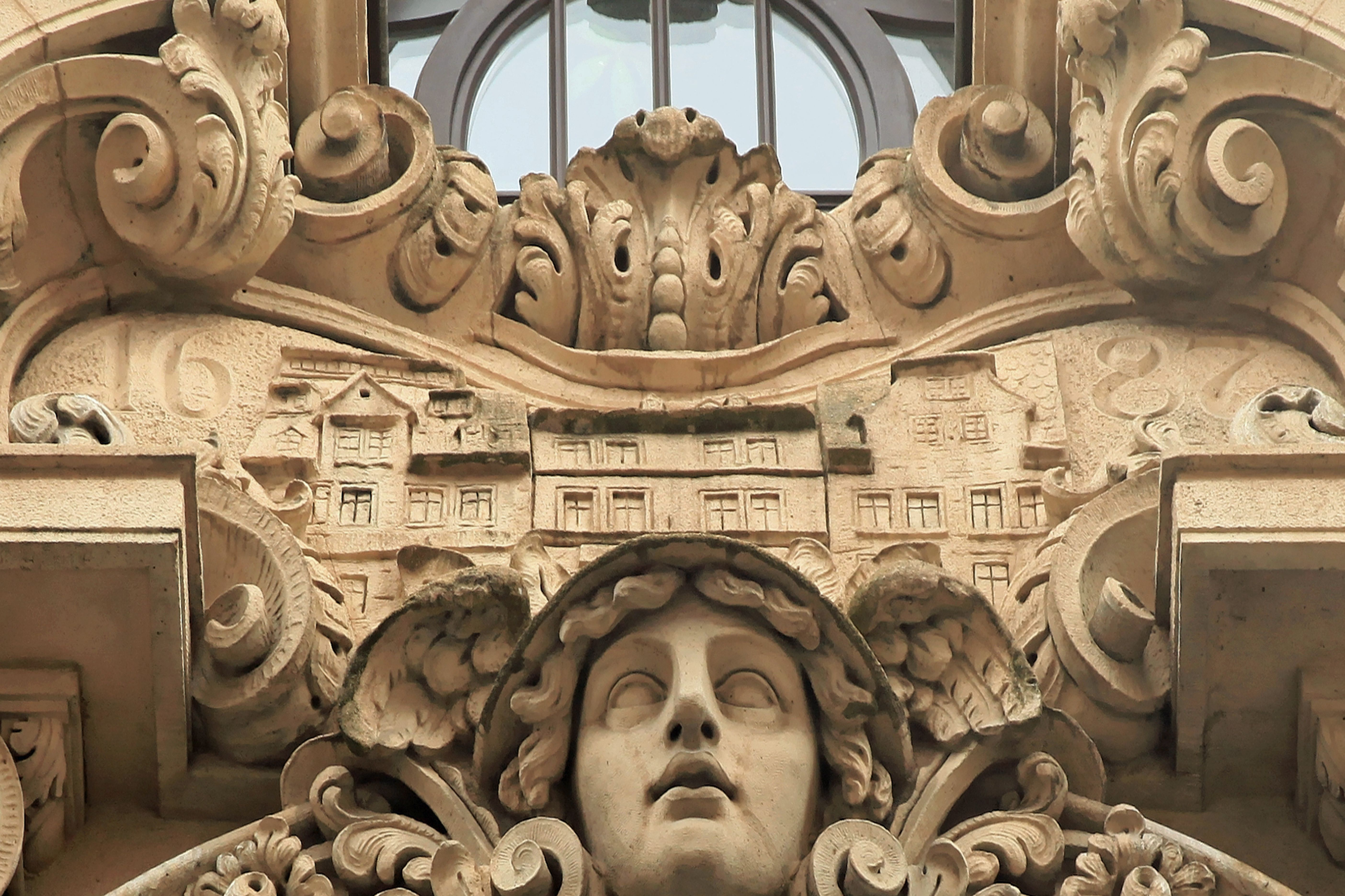 Darstellung der Vorgängerbauten am Giebel von Steibs Hof, Nikolaistraße 28-30-32 in Leipzig